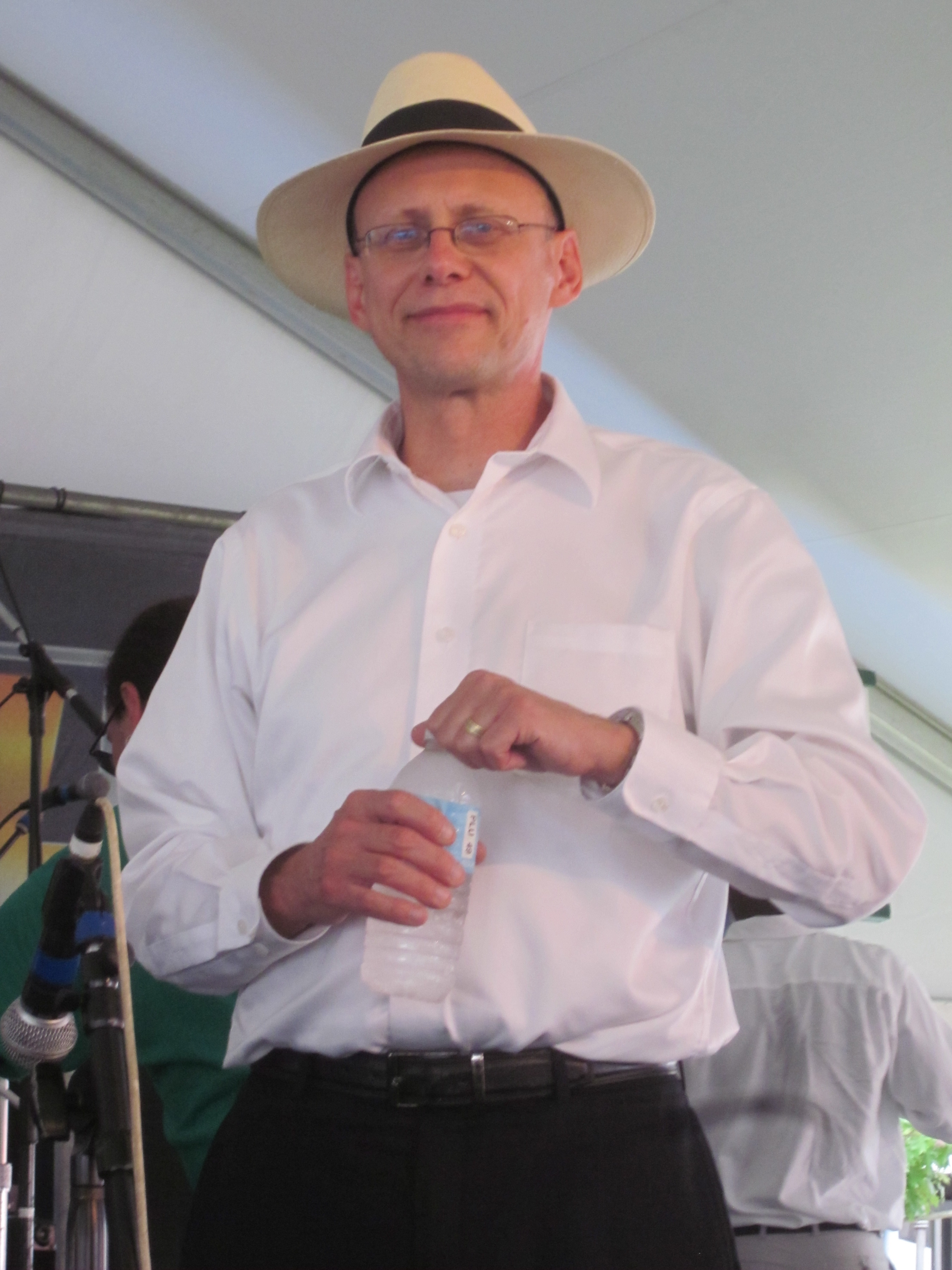 Satchmo SummerFest, New Orleans. Tom Fischer